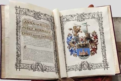 Ritterstandsdiplom von Franz Joseph I. (Kaiser von Österreich 1848-1916) für den Oberlieutenant des Infanterieregiments Nr. 47 Hermann [Ritter von] Hiltl (1872-1930) sowie dessen Mutter Anna und seine Brüder Josef und Ernst. Ausgestellt Wien, 21. Oktober 1903, mit eigenhändiger Unterschrift des Kaisers, Gegenzeichnungen des Ministerpräsidenten Ernest von Koerber und des Ministerialrats Stefan Freiherr von Kriegs-Au. Pergamentlibell, 8 Seiten, teilvergoldete Kalligraphie, teilweise gedruckte Bordüre, farbige Wappendarstellung. Violetter Samteinband (Format 38 x 29,5 cm) mit goldgeprägter Doppeladlerdarstellung, Vorsatz aus gewässerter Seide, anhängendes großes kaiserliches Wachssiegel in vergoldeter Kapsel (Durchmesser 12 cm). Ritterstandsdiplom in originaler verzinnter Eisenblechkassette (Format 53 x 30 cm) mit aufgeklebtem Ausschnitt des Übersendungsschreibens, graues Stoff-Futteral.